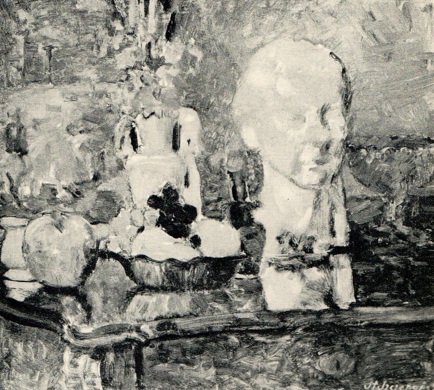 Stanisław Szczepański, Martwa natura z rzeźbą, 1954r.